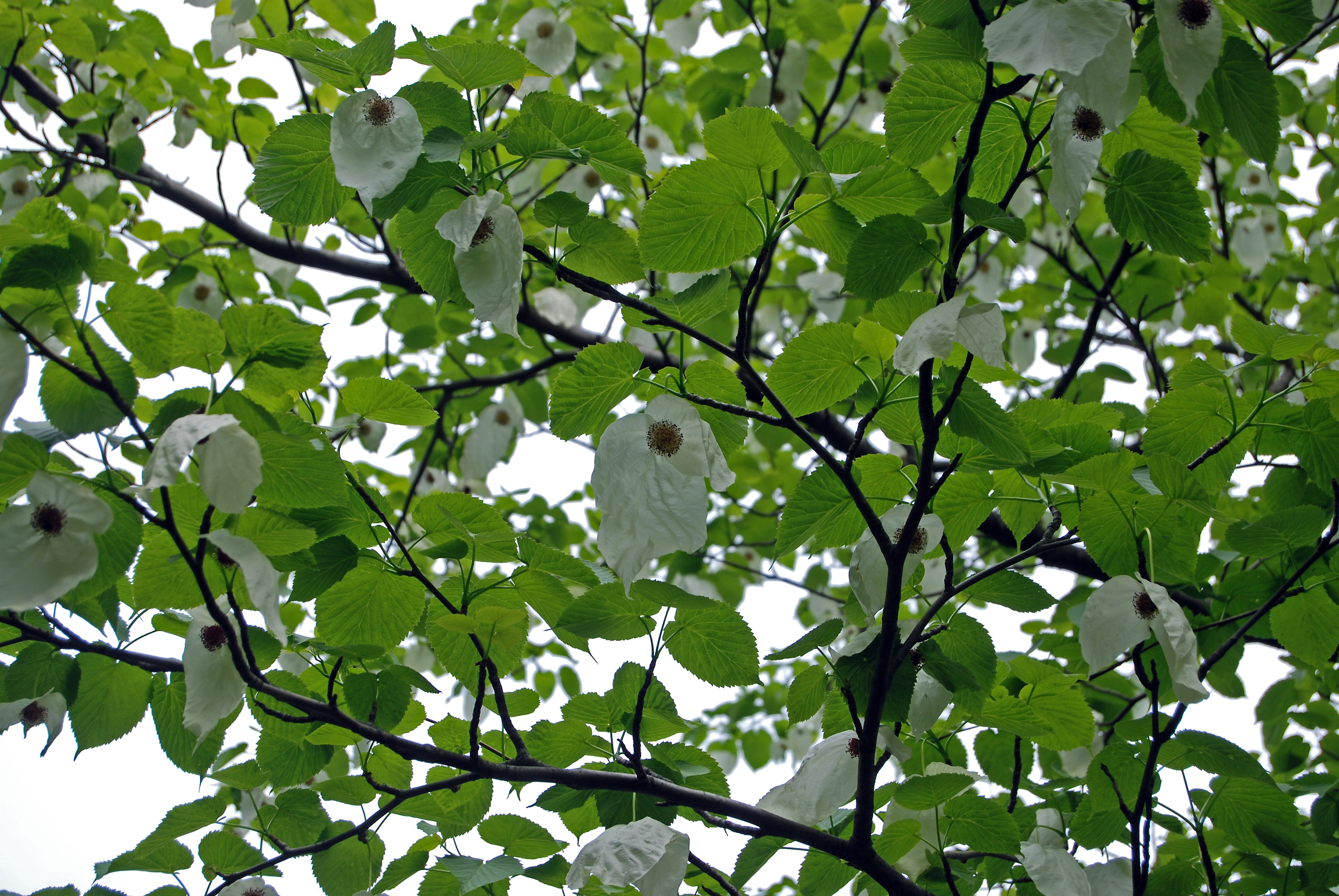 Näsduksträd